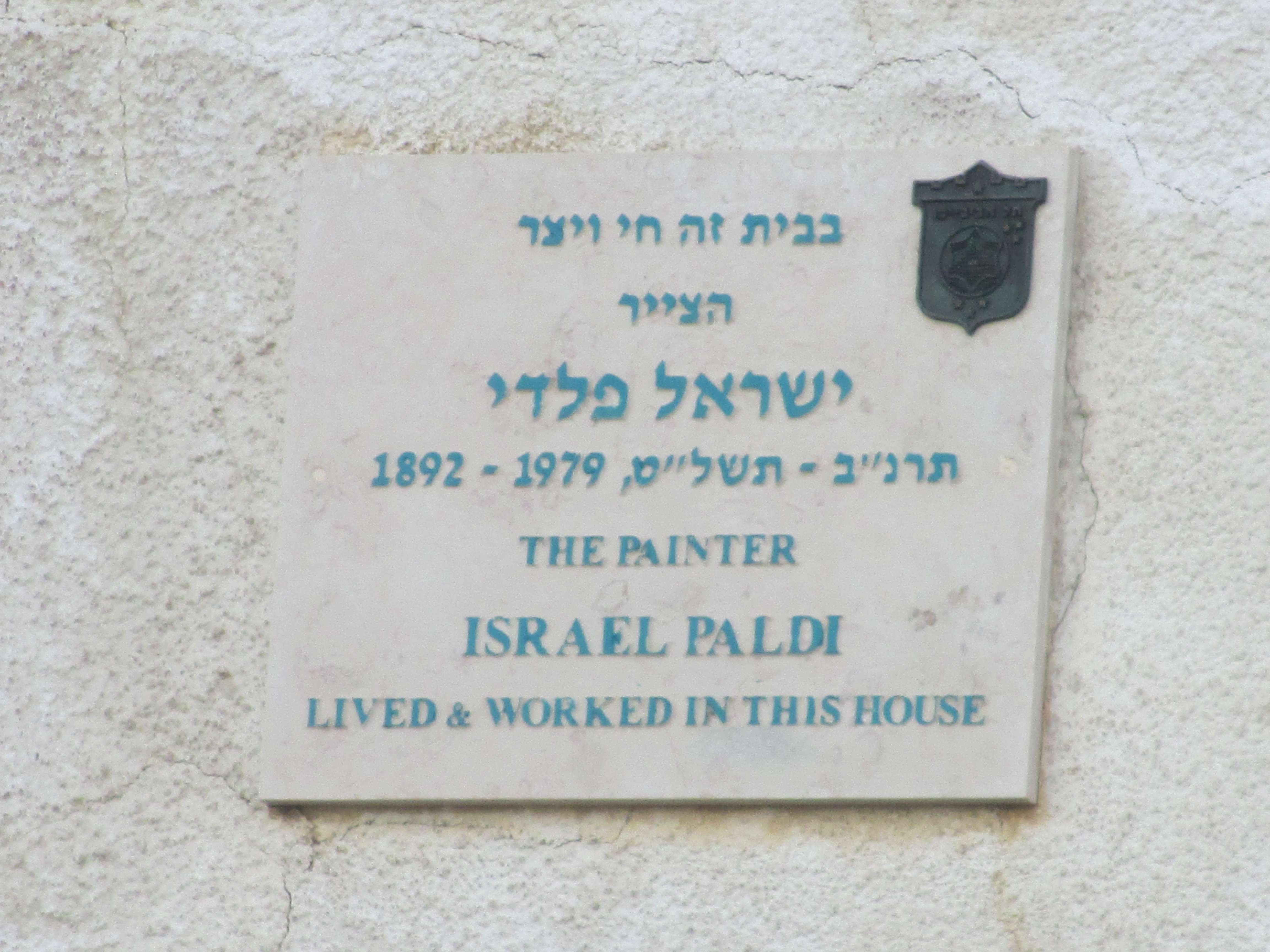 לוחית זיכרון על ביתו של הצייר ישראל פלדי ברח' הירקון 264 בתל אביב